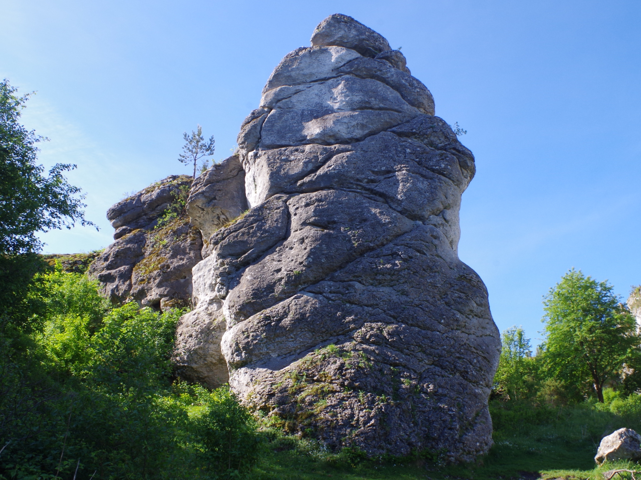 Krótka Grzęda w grupie skał Mirowskich. Widok od północy